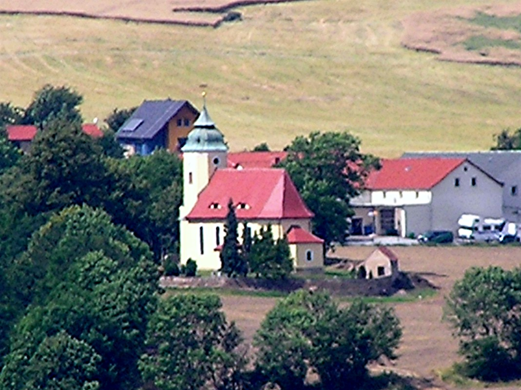 Kirche zu Borna (Bahretal)